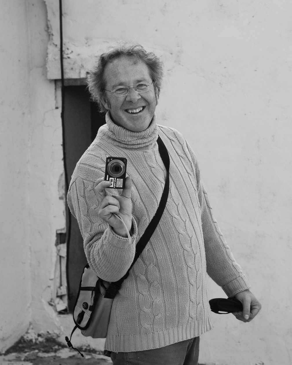 Jorge Villalmanzo (1960-2012), escritor y poeta español.